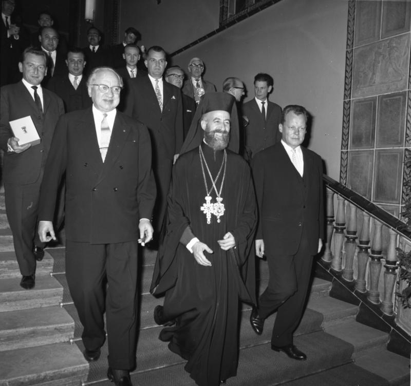 Staatsbesuch Zypern - West-Berlin Empfang Schöneberger Rathaus